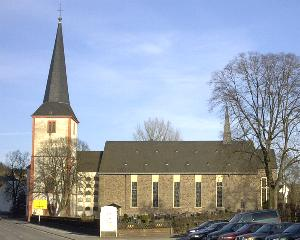 Die Schönecker Doppelkirche "Unserer lieben Frau" und "St. Leodegar"